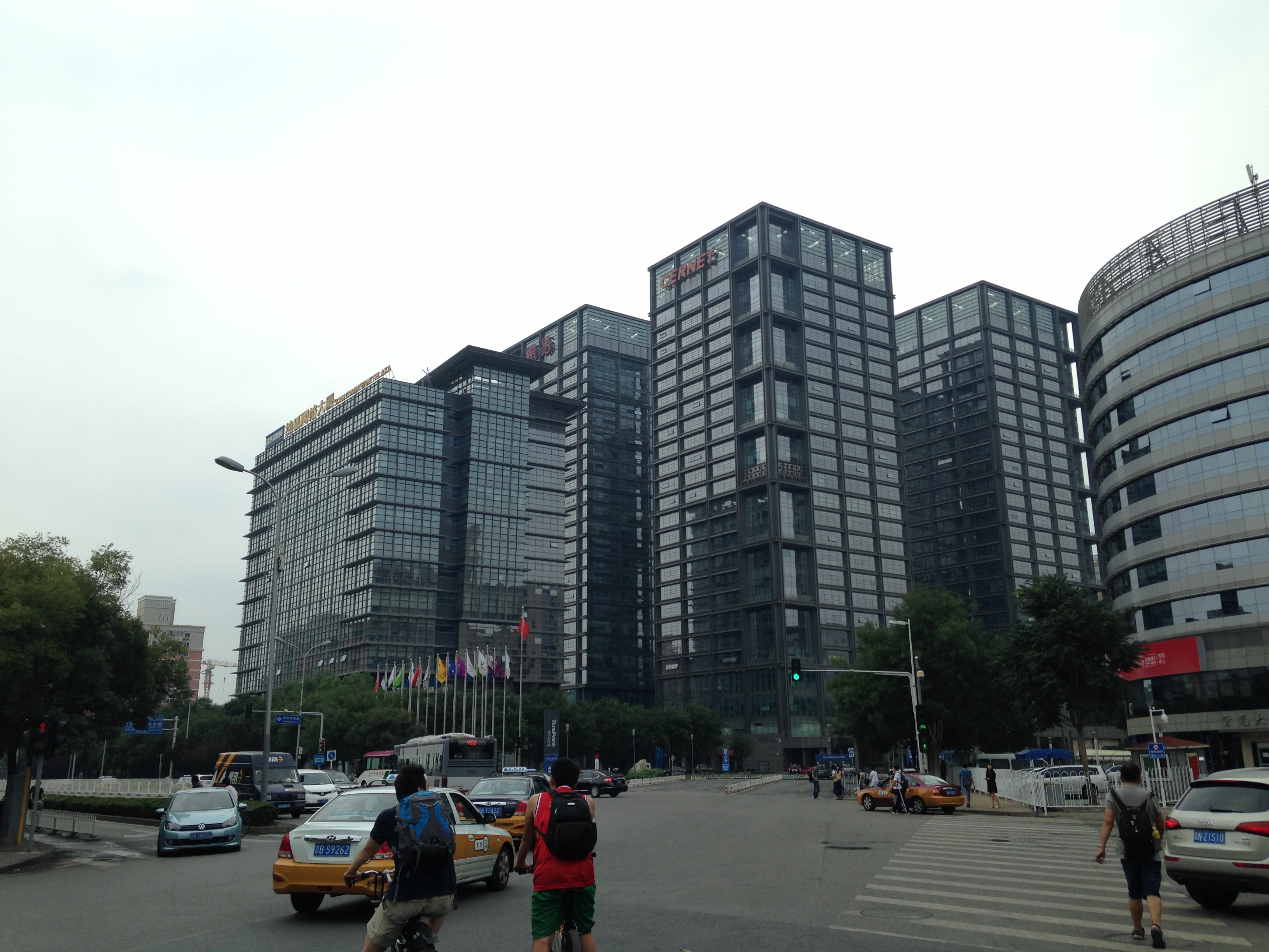 清華大学正門付近のビル群